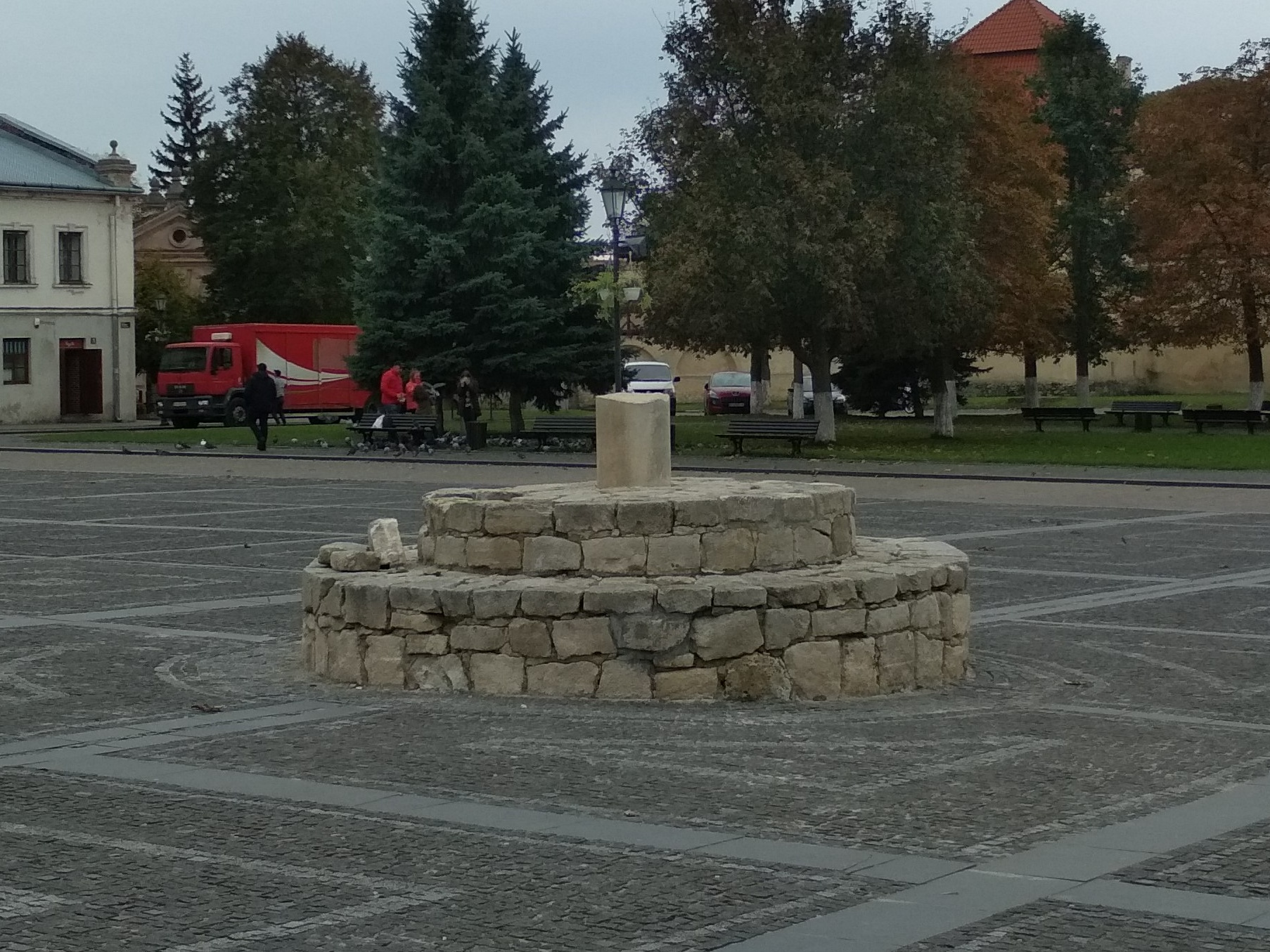 Żółkiew - Rynek